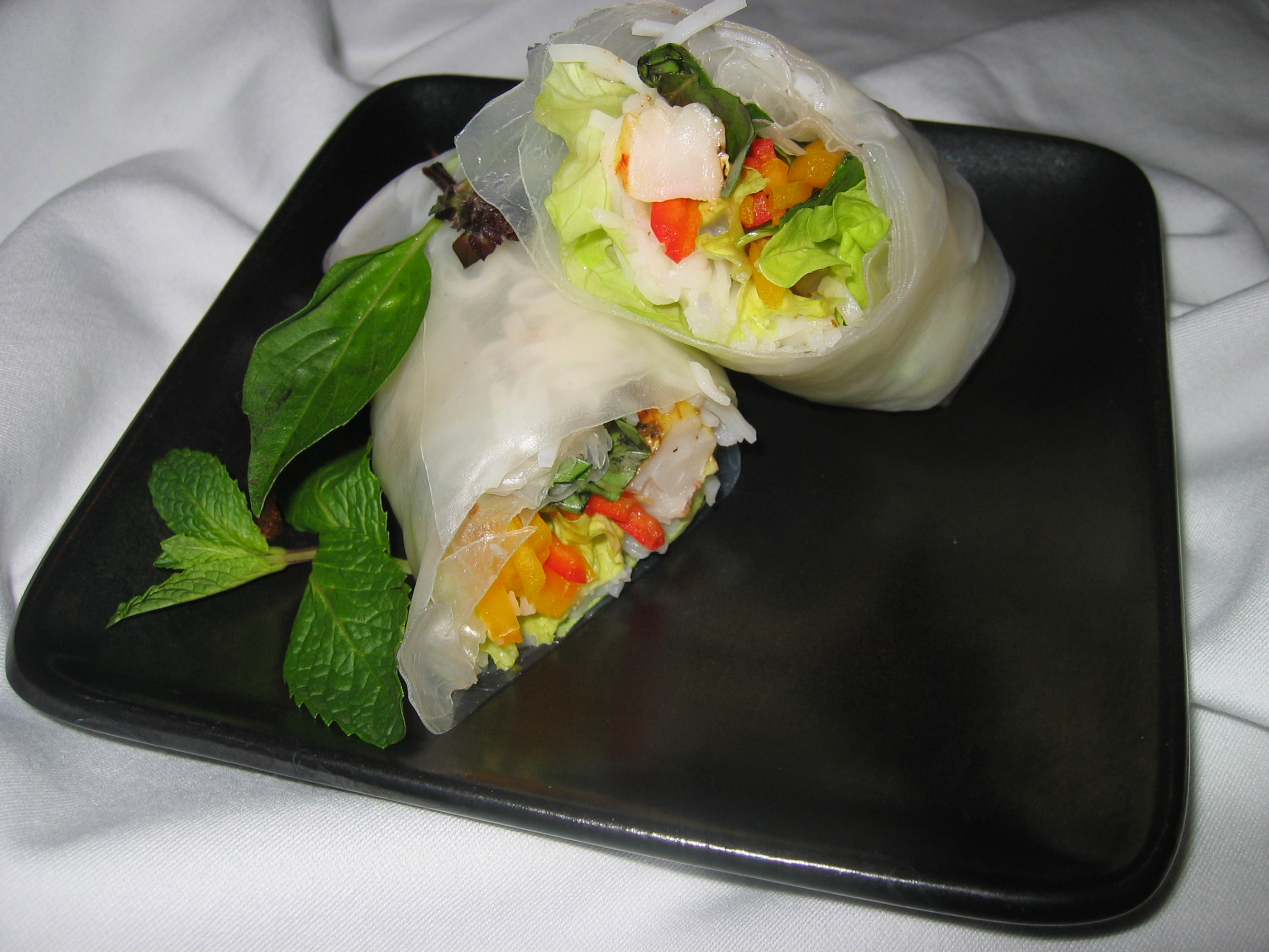 Gourmet spring rolls